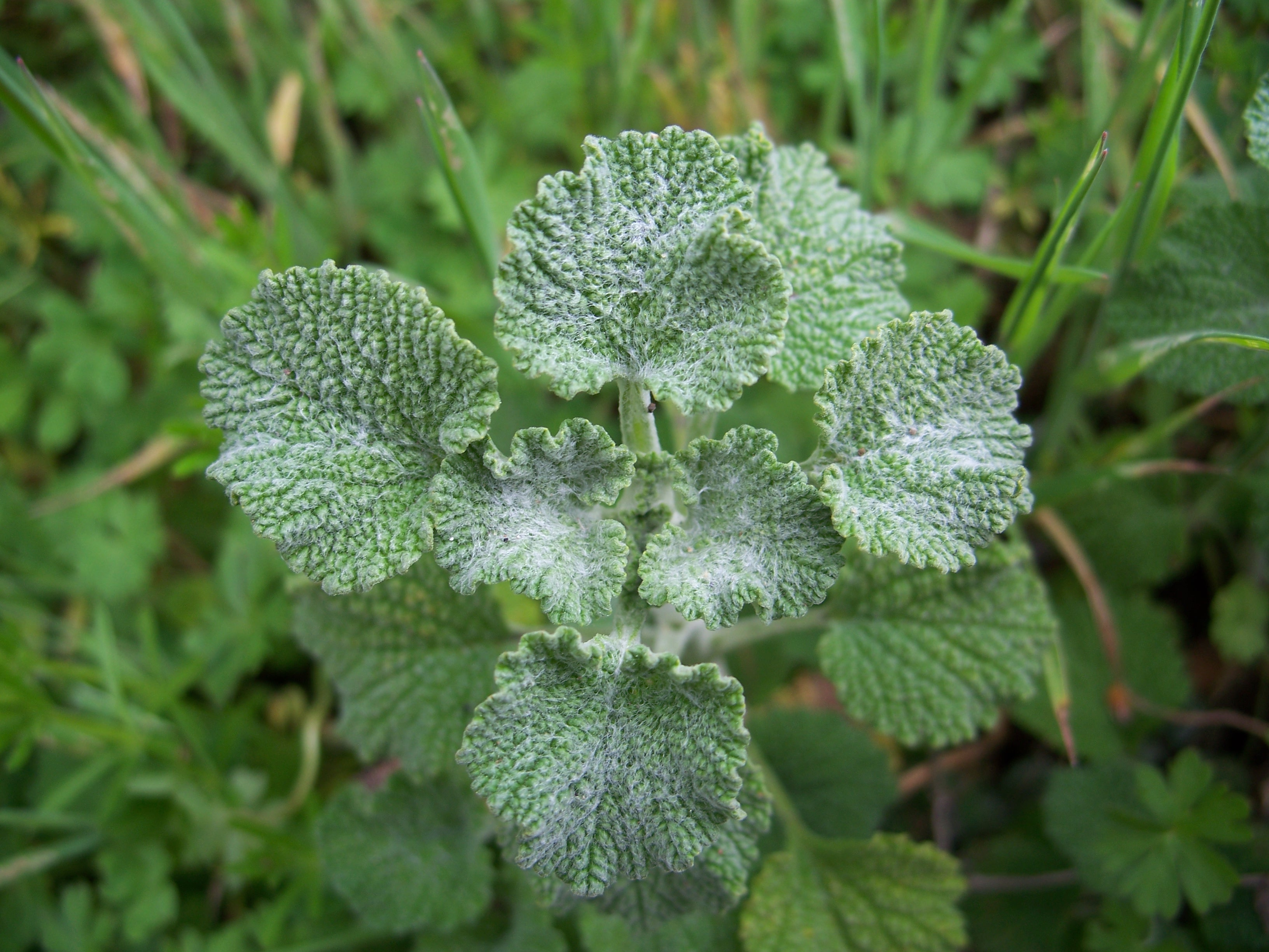 Marrubium vulgare Made in Los Gatos, California, USA. Identified by Franz Xaver.